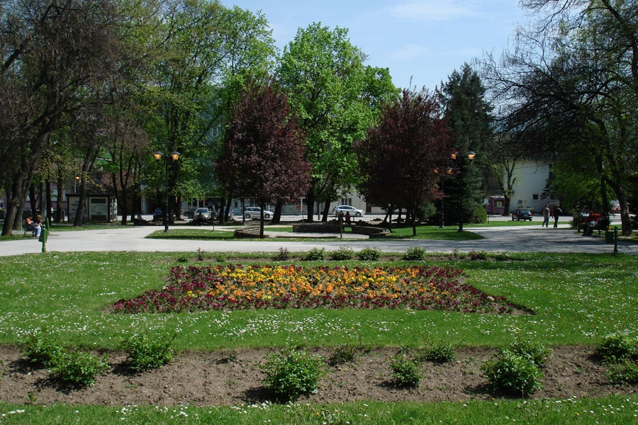 Градски парк у Горњем Милановцу